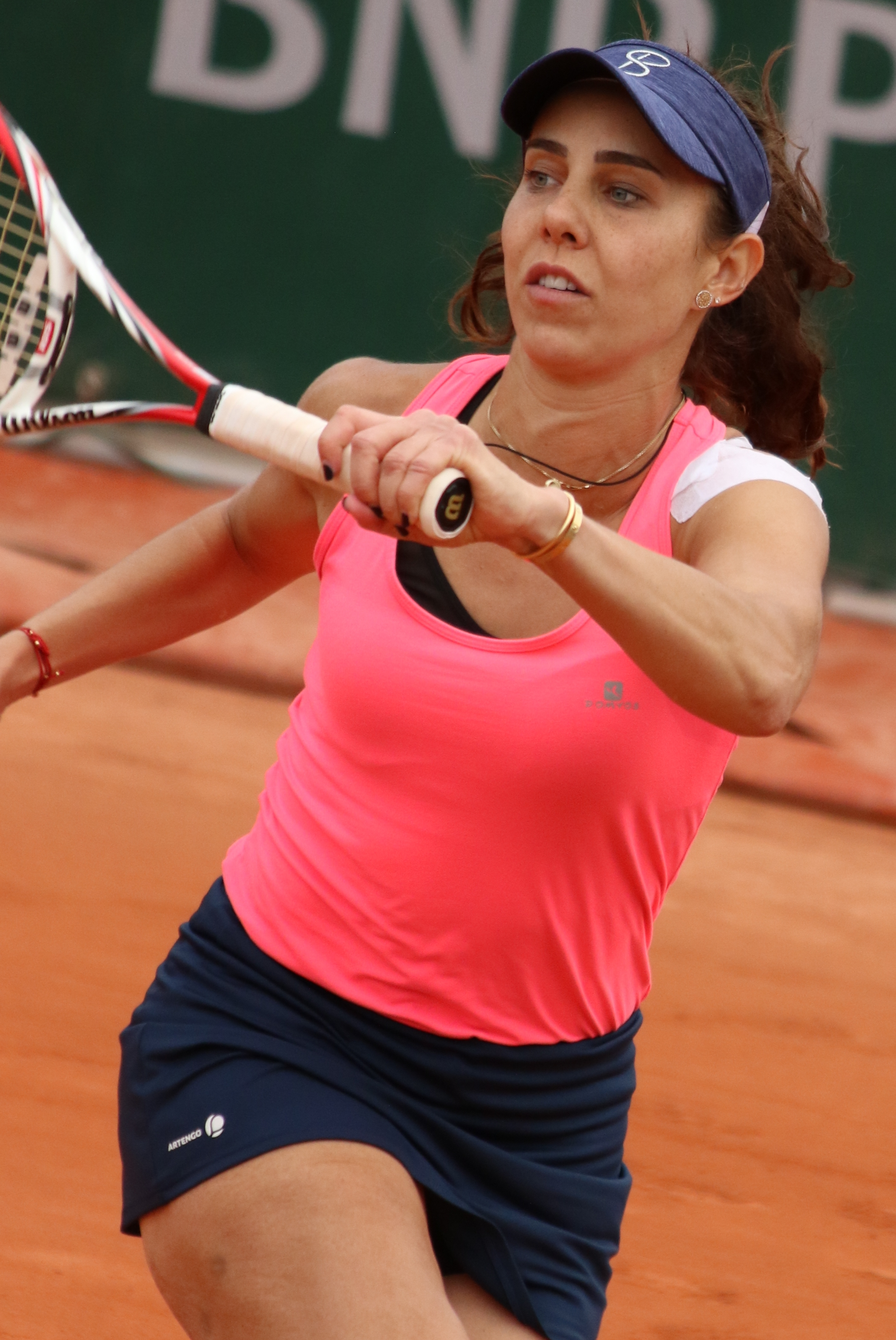 Buzarnescu RG19 (12)